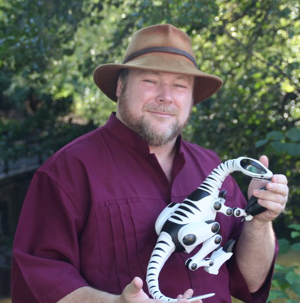 Mark Tilden in Oslo, Norway